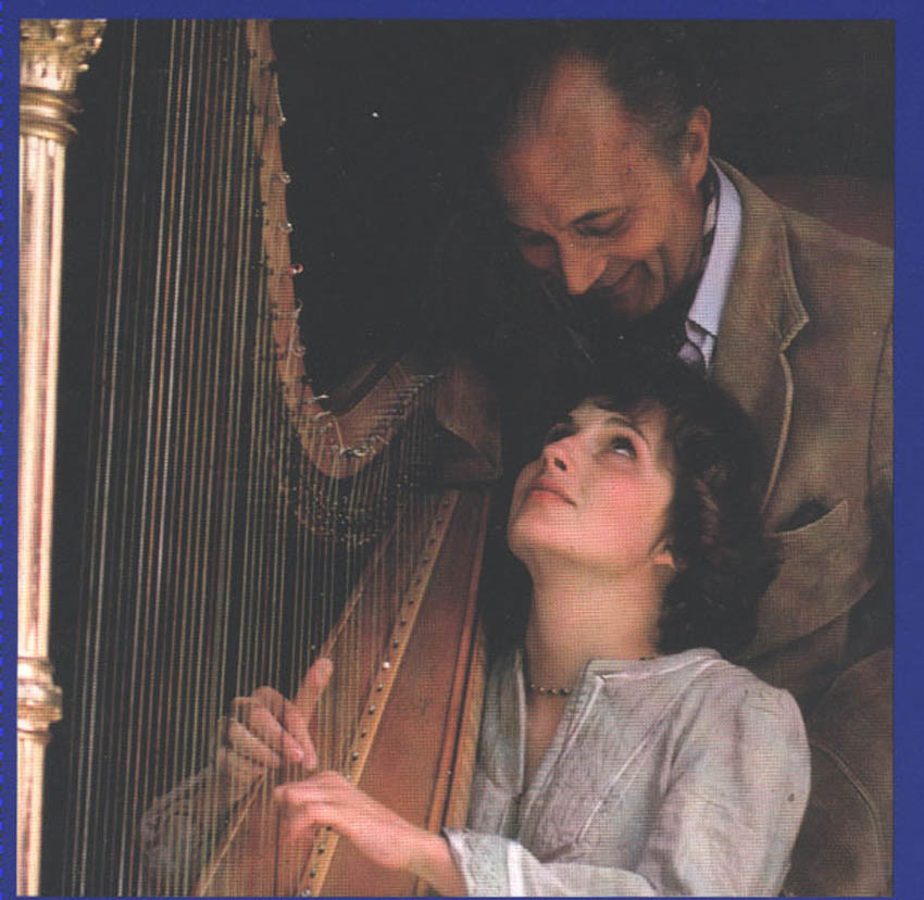 Bernnard Géliot, ténor, accompagné par sa fille Martine